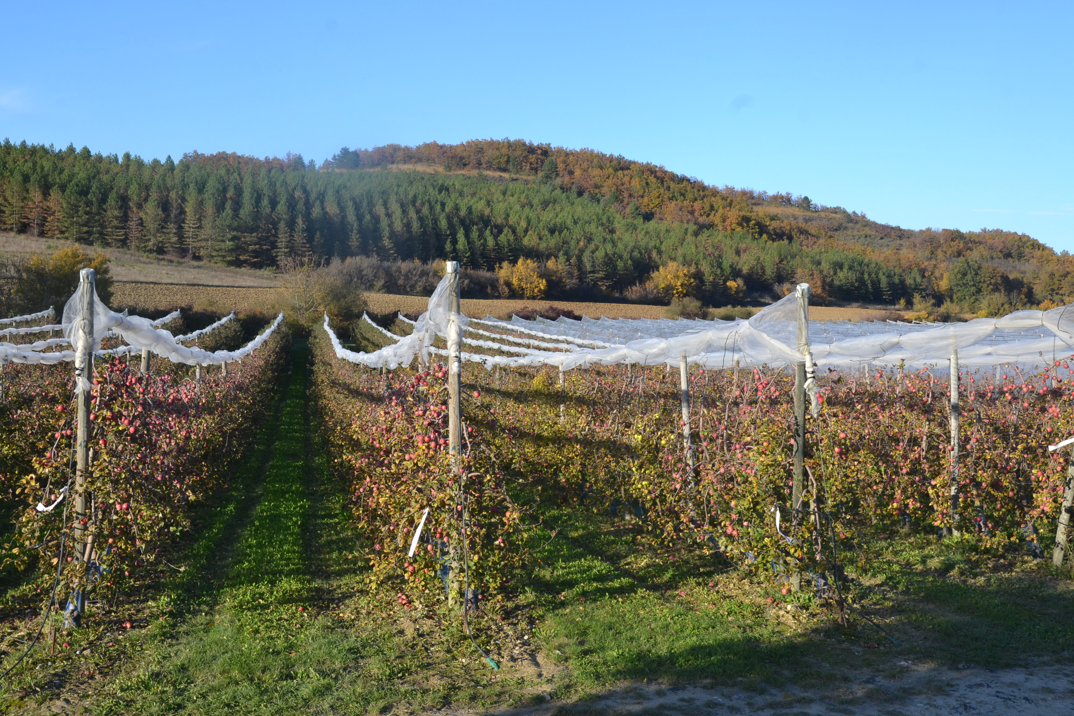 Vergers de pommiers, Cazals-des-Bayles (Ariège, France).